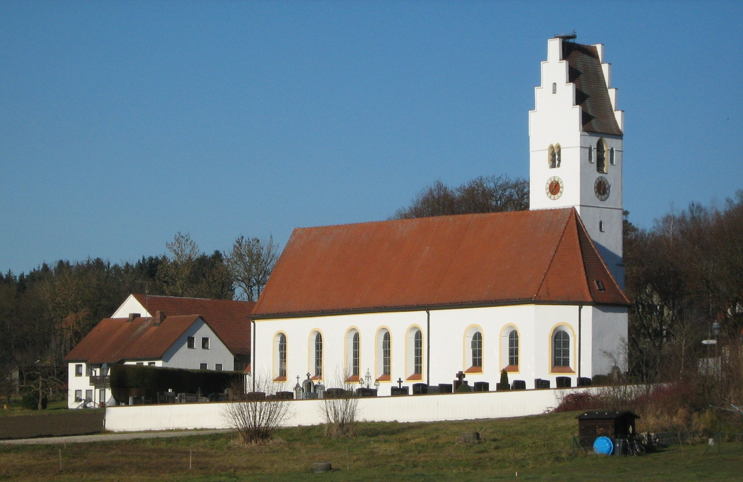 Kirche St. Alban in Eisenhofen